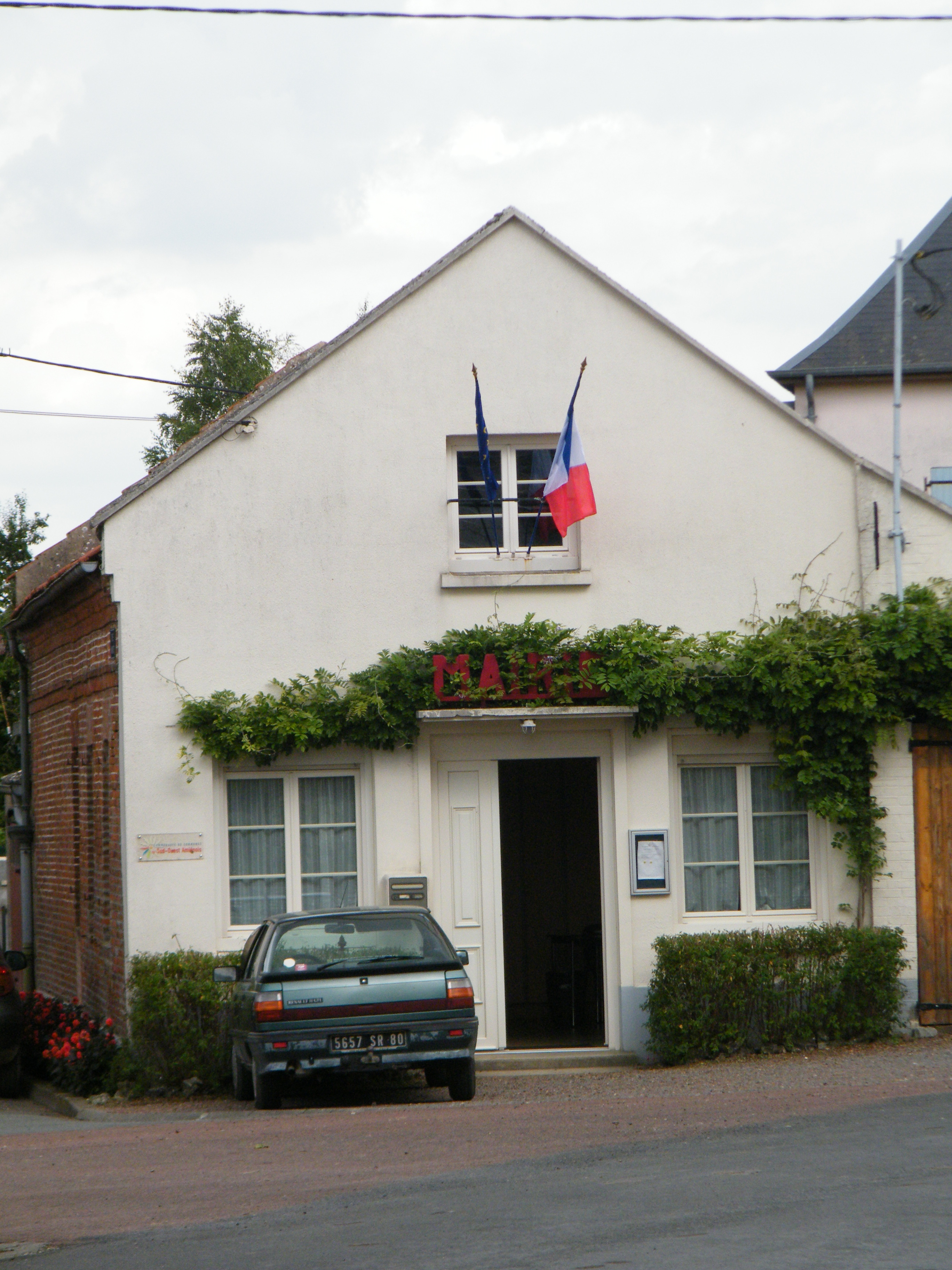 Mairie.